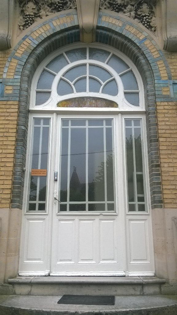 Porte d'entrée d'un bâtiment dessiné par l'architecte Octave Gelin, rue du Maréchal Leclerc, à Châlons-En-Champagne, 1910